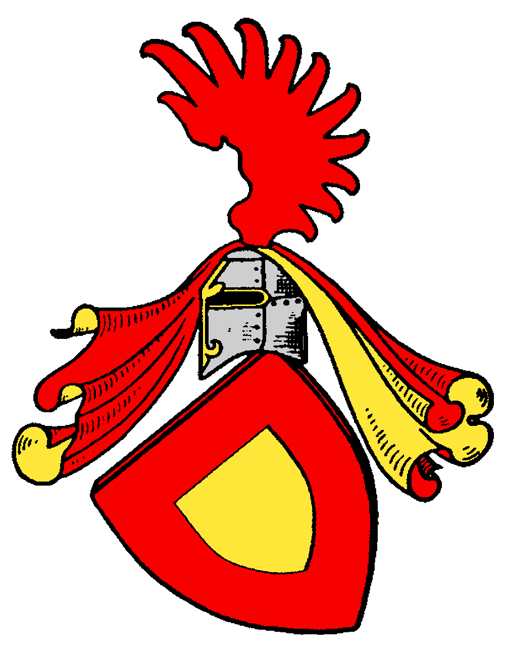 Stammwappen der von Broich / de Brouch